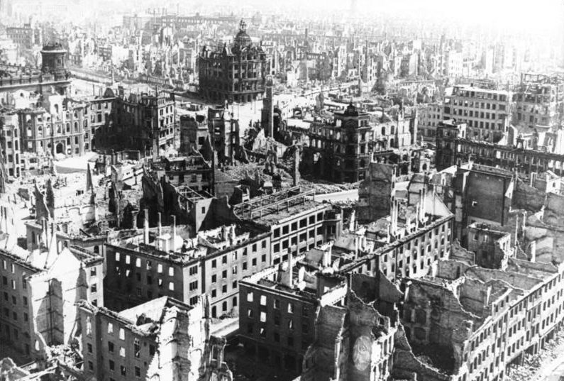 ADN-ZB/G. Beyer Dresden 1945: Blick vom Rathausturm auf die zerstörte Stadt. Im Vordergrund der heutige Pirnaische Platz.